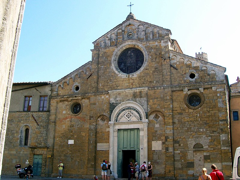 Volterra - Duomo